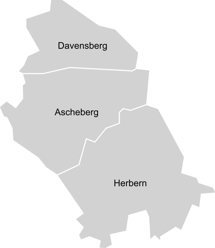 Ortsteilskarte von Ascheberg